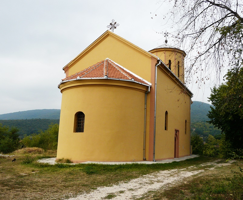 Crkva Podgorac